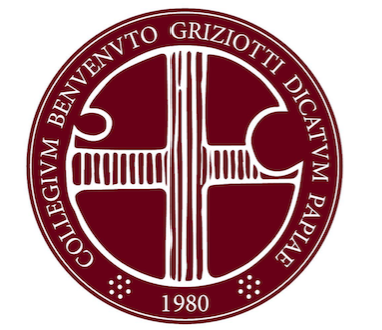 Il logo del Griziotti